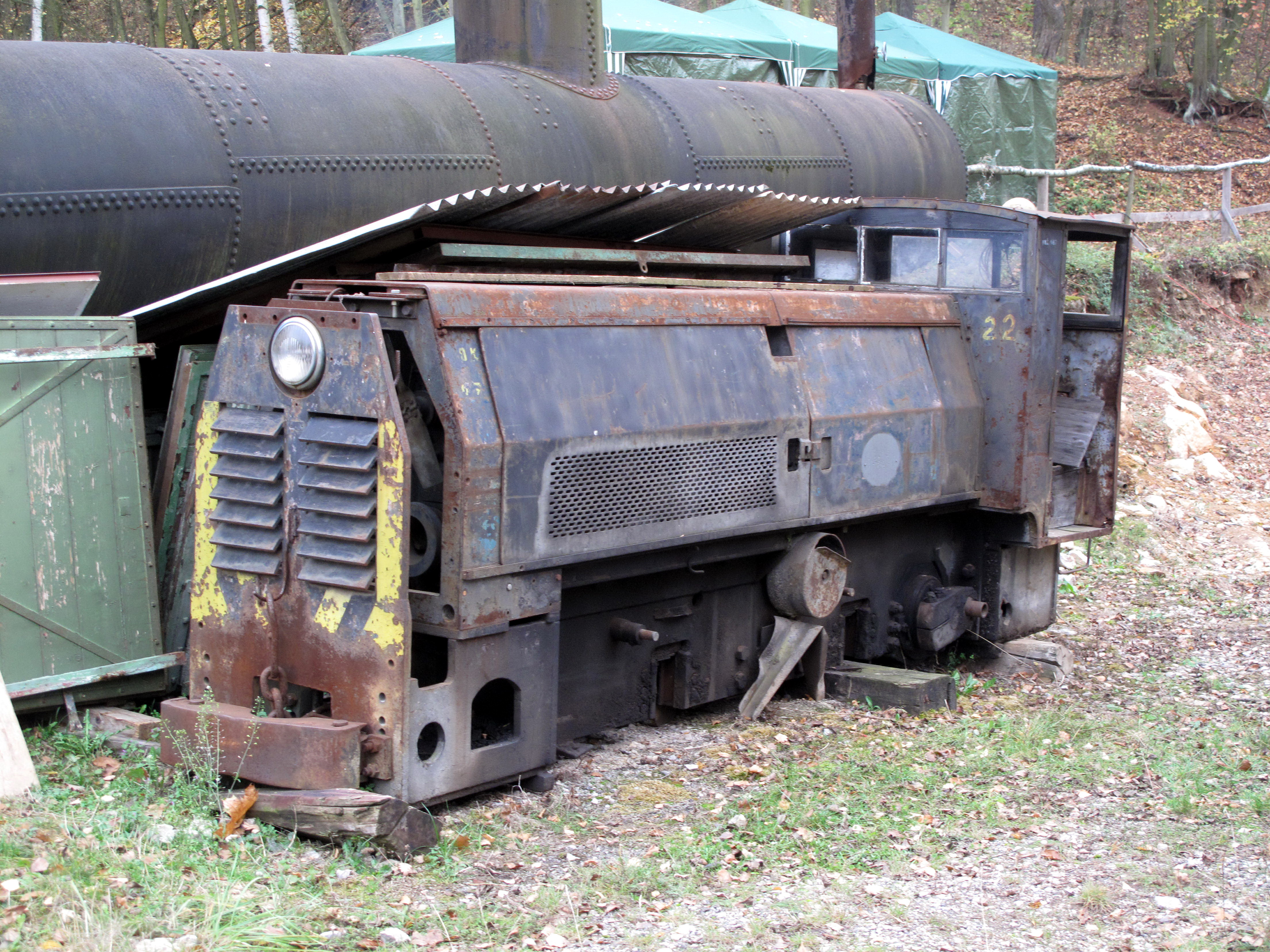 Deutz A6M517G, Solvayovy lomy, dříve jezdil na vlečce ve Zlivi